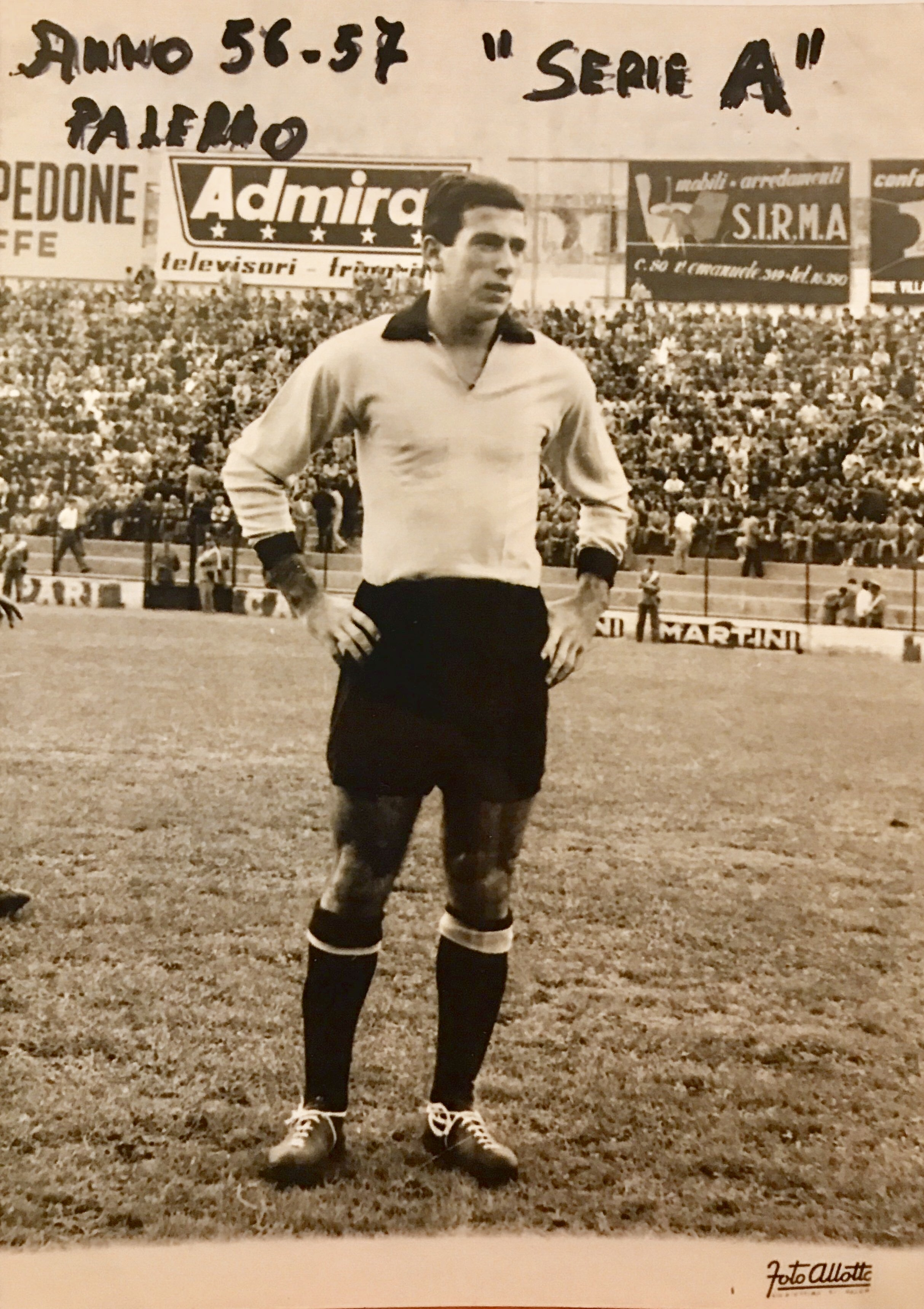 Anno 1956-1957 "Serie A" Palermo